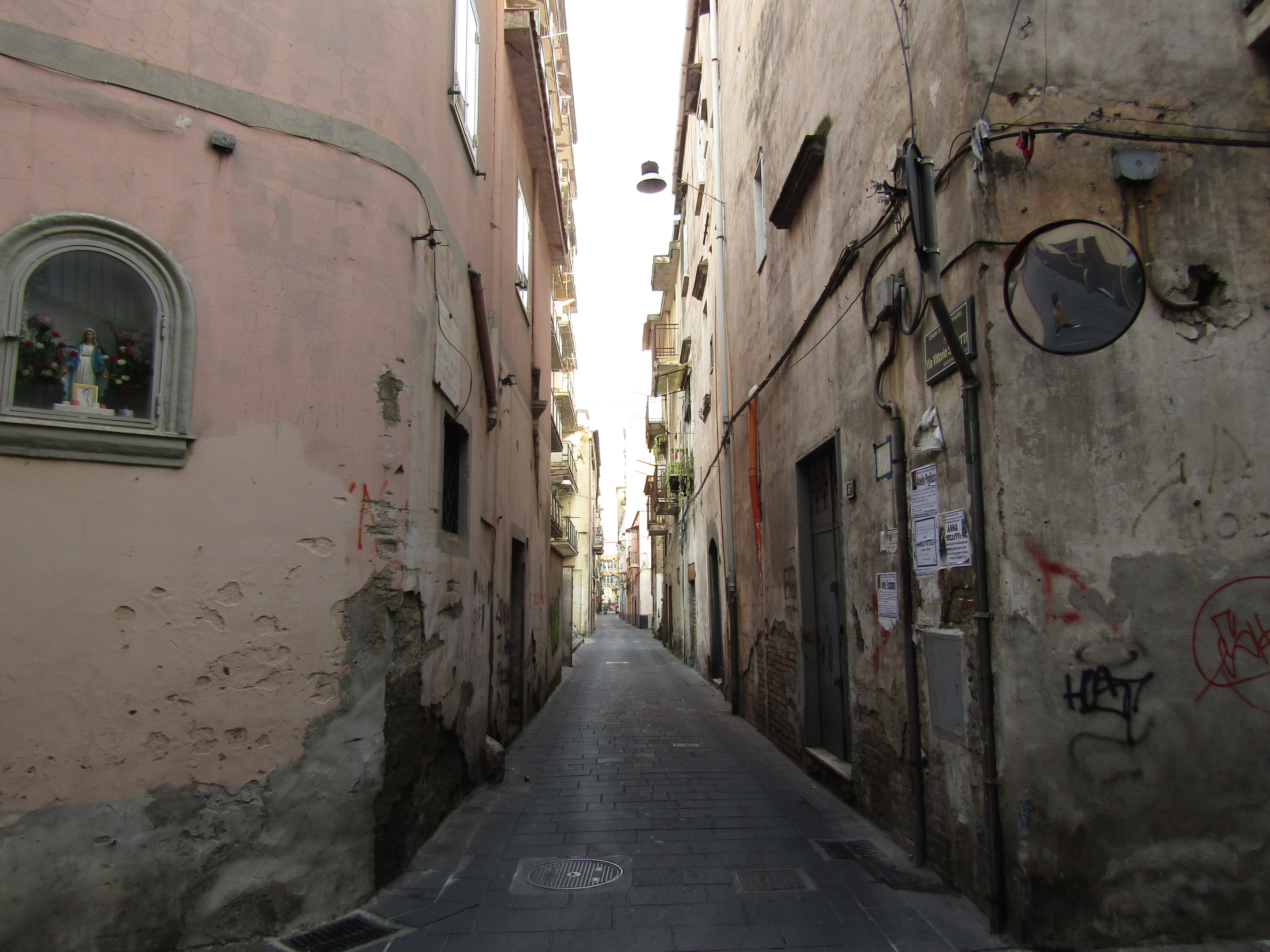 {Informazioni file |Descrizione = Strettola di Capocasale, Nocera inferiore. |Fonte = Mariano Rocco |Data = 22/02/2019 |Autore = Mariano Rocco |Licenza = vedi sotto |Detentore copyright = Mariano Rocco |EDP = |Altre versioni =